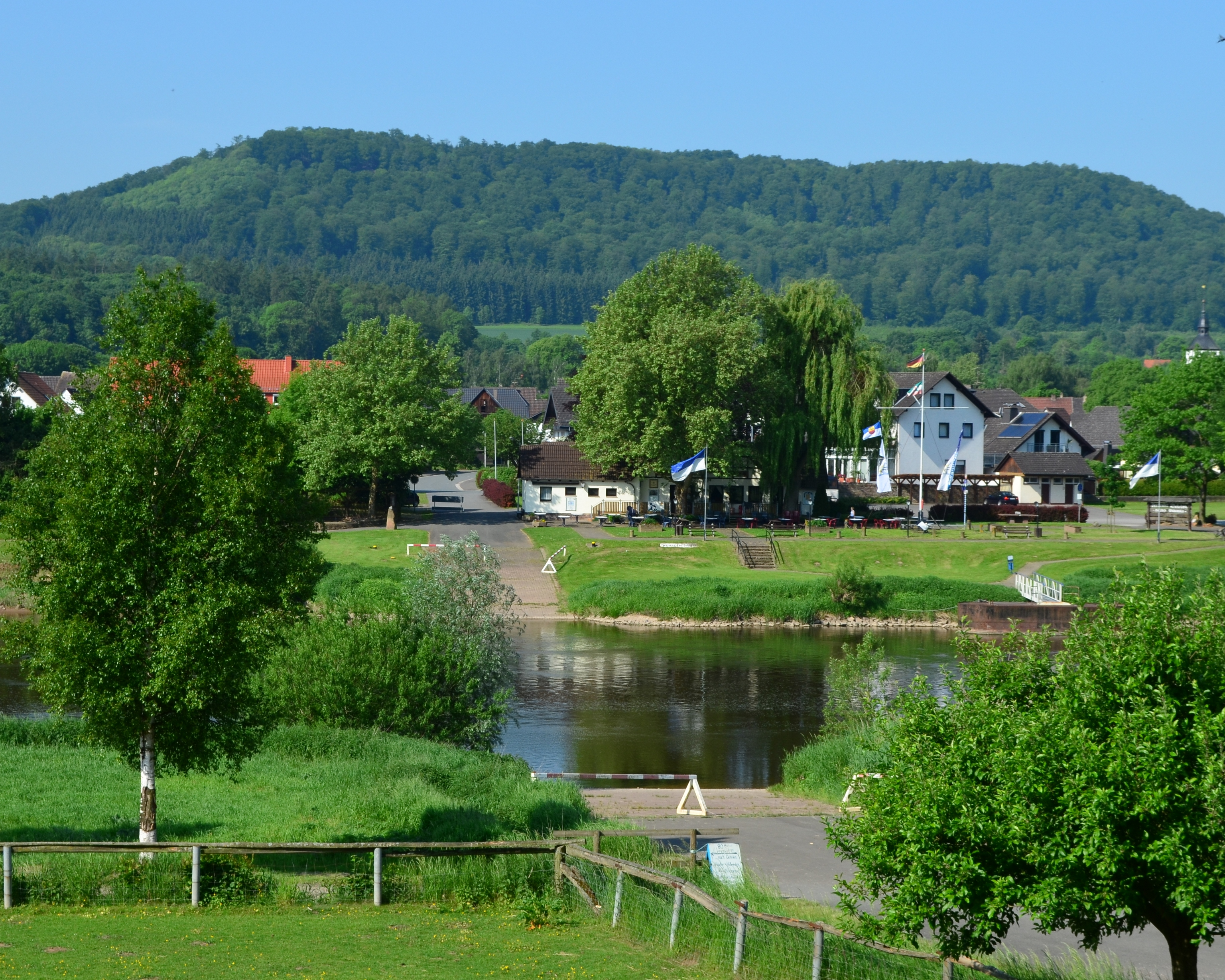 Ersatzübergangsstelle in Wehrden vom gegenüberliegenden Ufer fotografiert